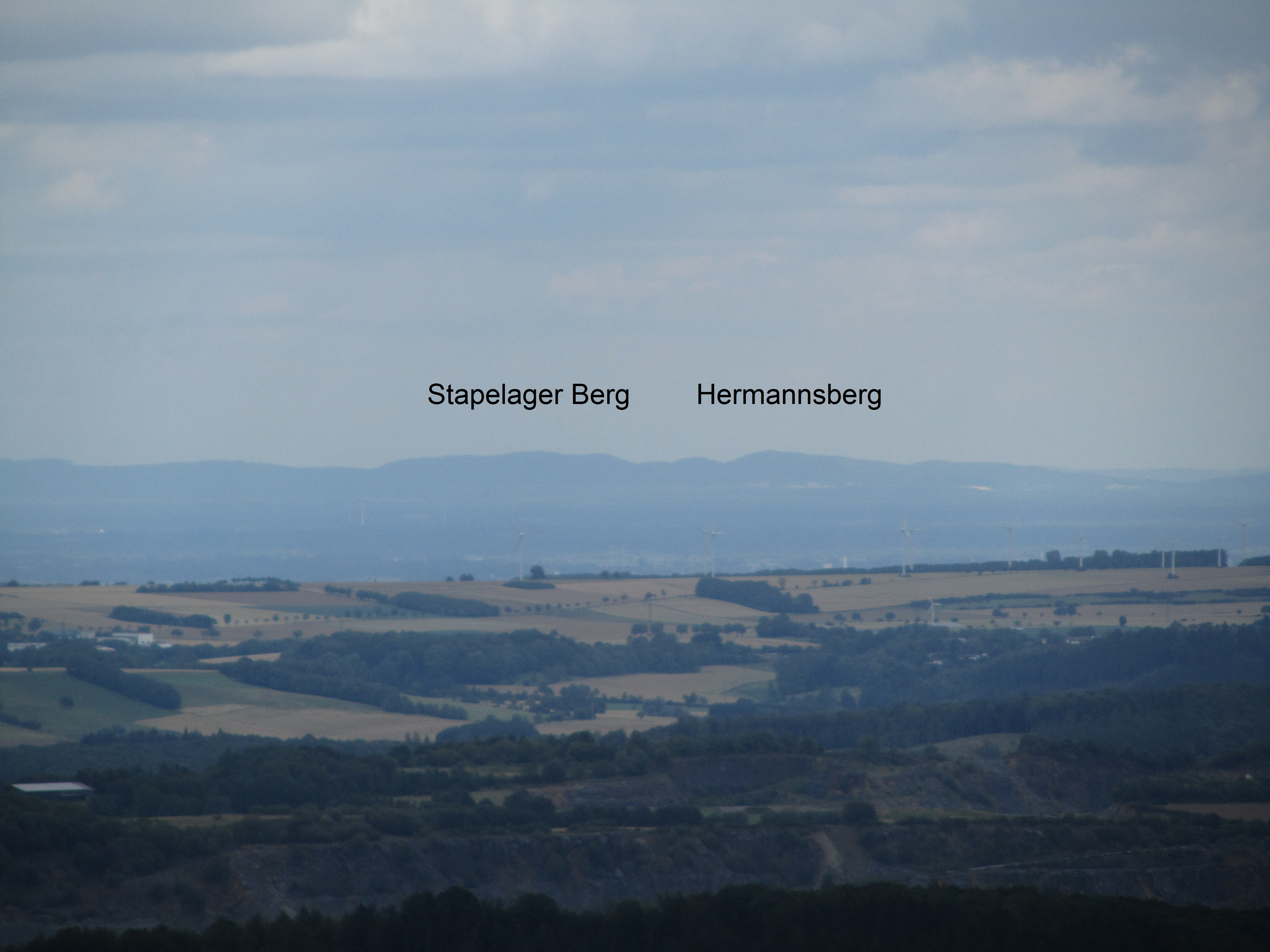 Distanzaufnahme (65 km) vom Lörmecketurm im Arnsberger Wald (581,5m) zum Stapelager Berg (365 m, links) und zum Hermannsberg (364 m, rechts). Im Vordergrund der Haarstrang